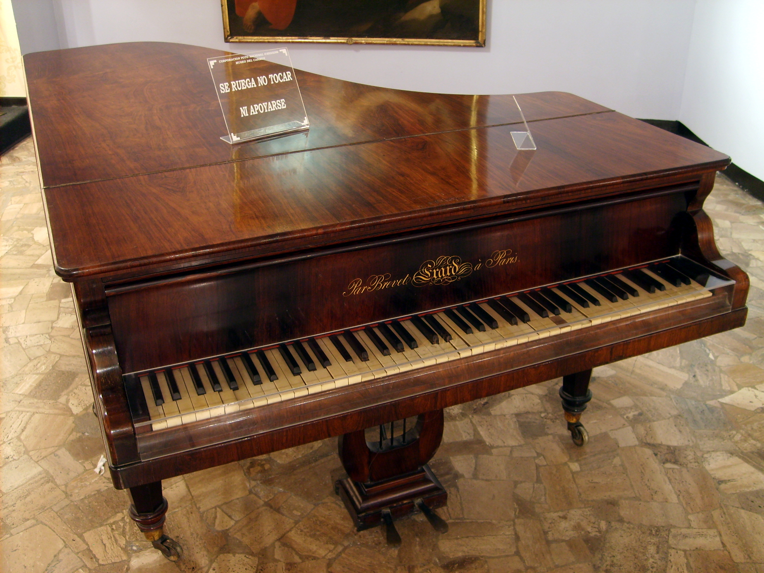 Piano francés Érard con caja de resonancia hecha de Palisandro. Perteneció a Andrés Bello. Forma parte de la colección del Museo del Carmen de Maipú, en Santiago de Chile.